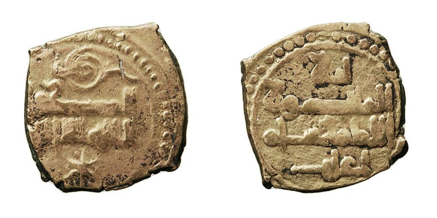 Fracción de dinar acuñada en electrón (aleación de oro y plata) durante el reinado de Yahya I Al Mamun, rey de la Taifa de Toledo y Valencia. Año 435-467 de la Hégira. Moneda muy escasa y muy bien conservada. V.No cat.